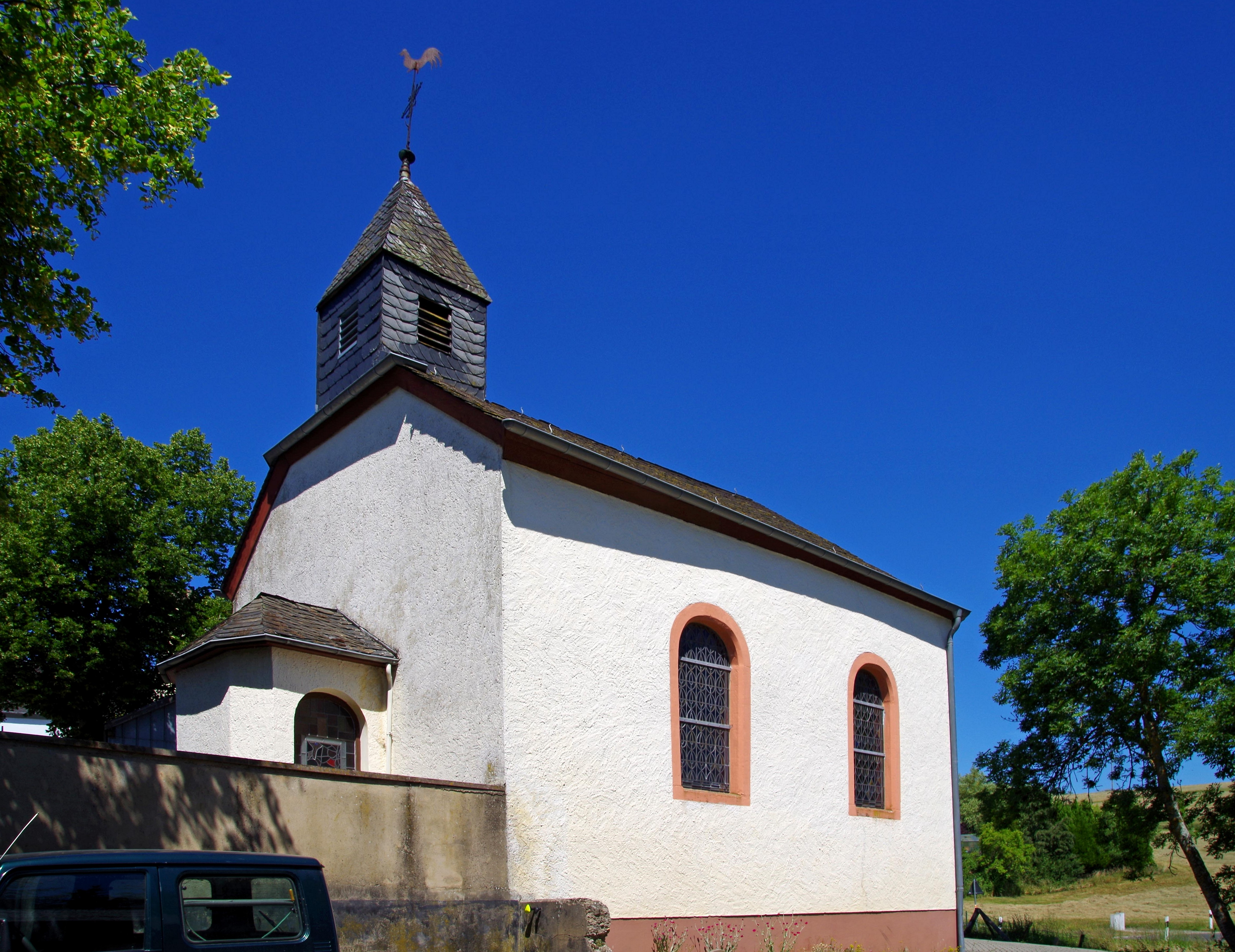 Kapelle Affler (1887), Dorfstraße 4